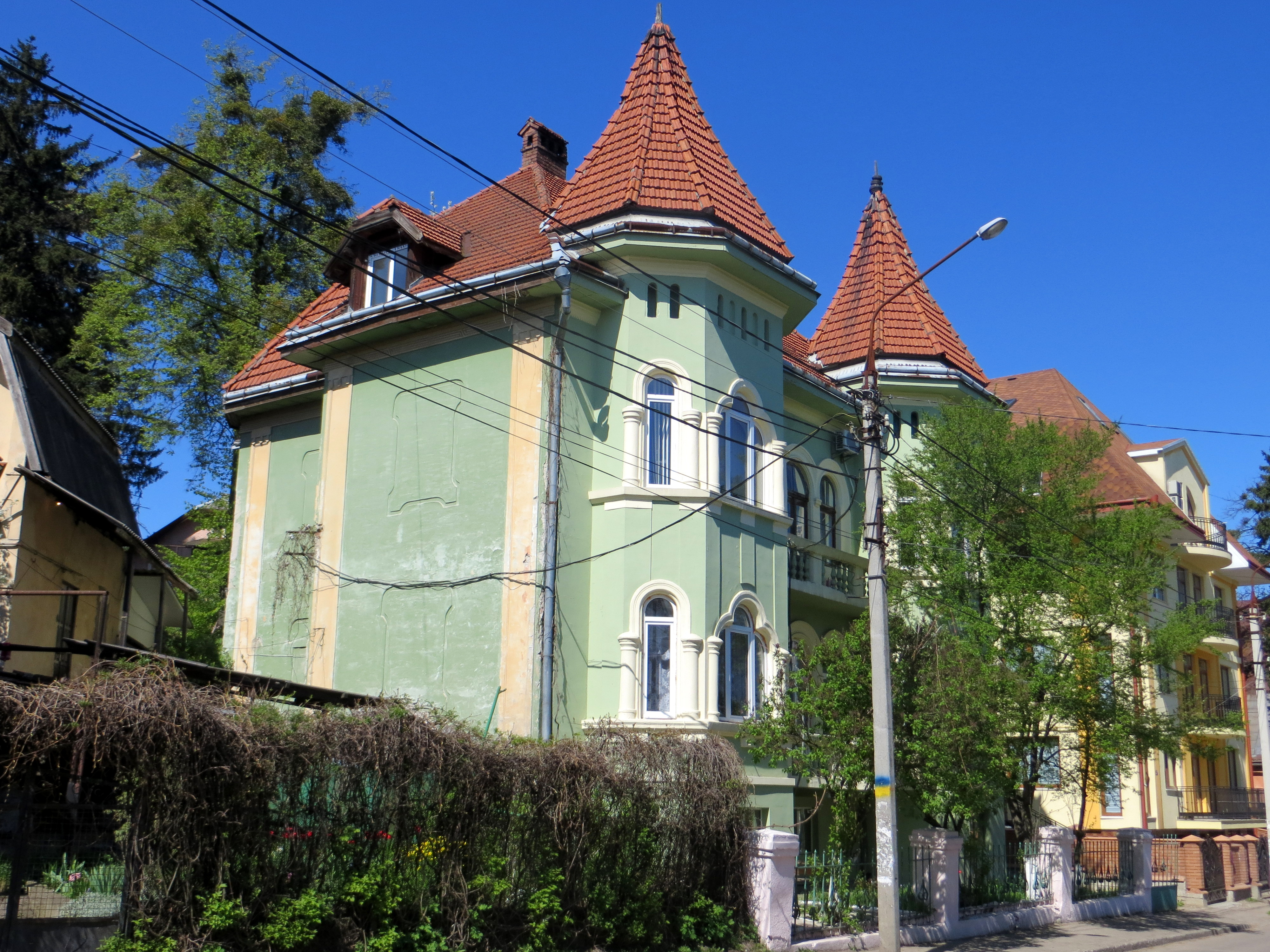 Житловий будинок, Чернівці, Федьковича Юрія, 54